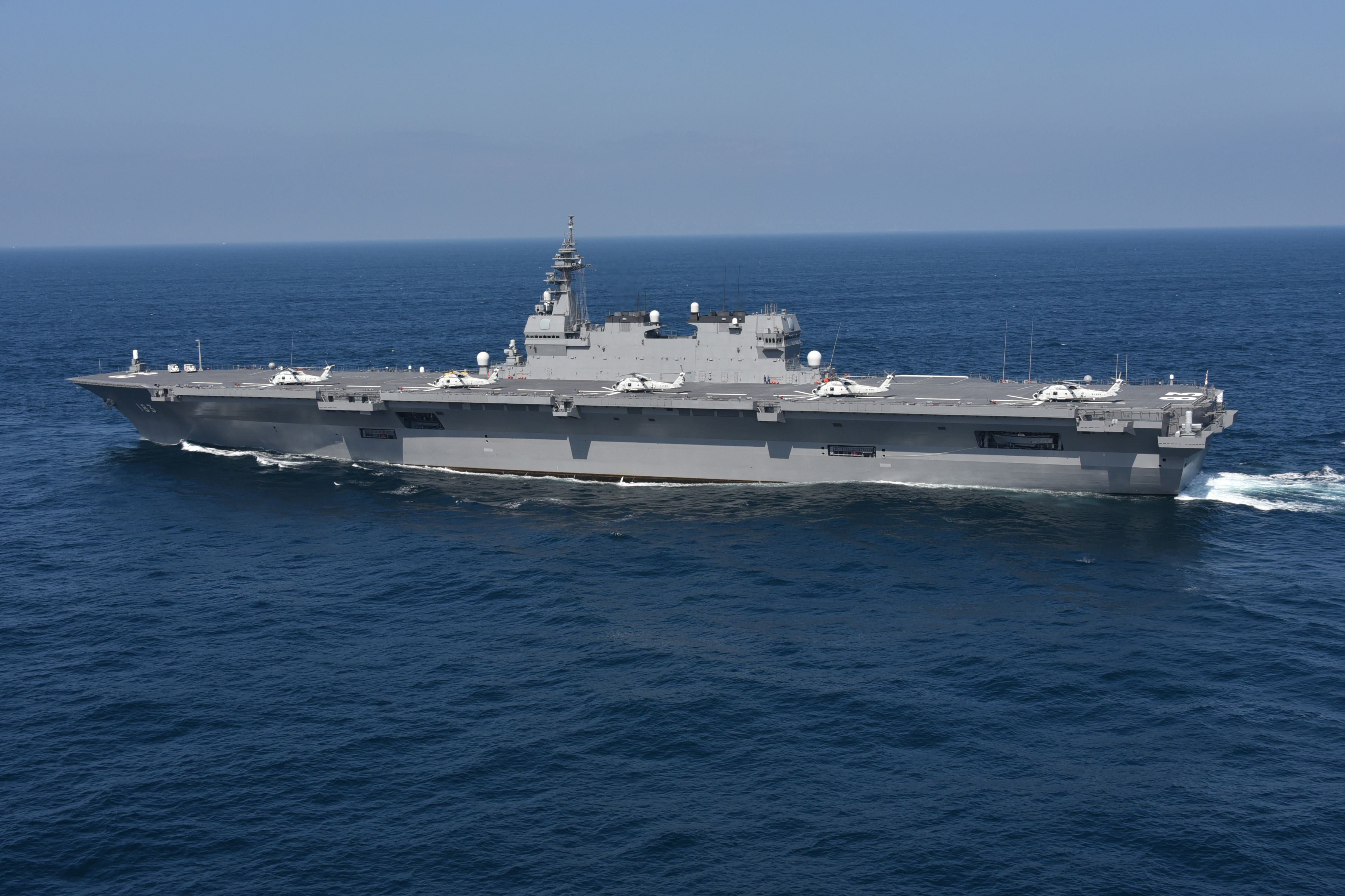 DDH-183 いずも